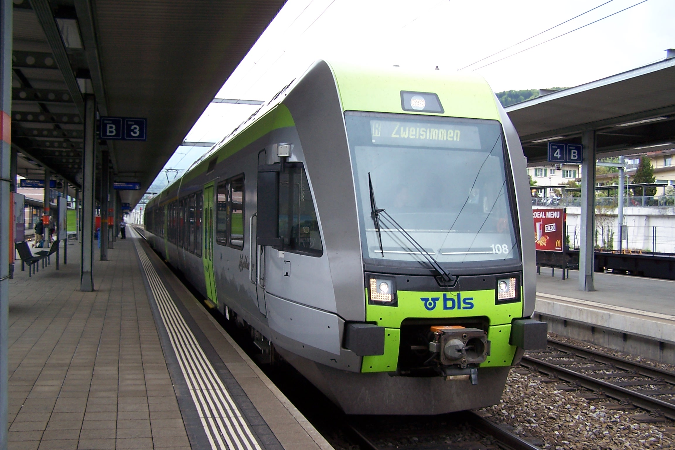 Bombardier NINA 108 in Spiez zur Abfahrt nach Zweisimmen bereit